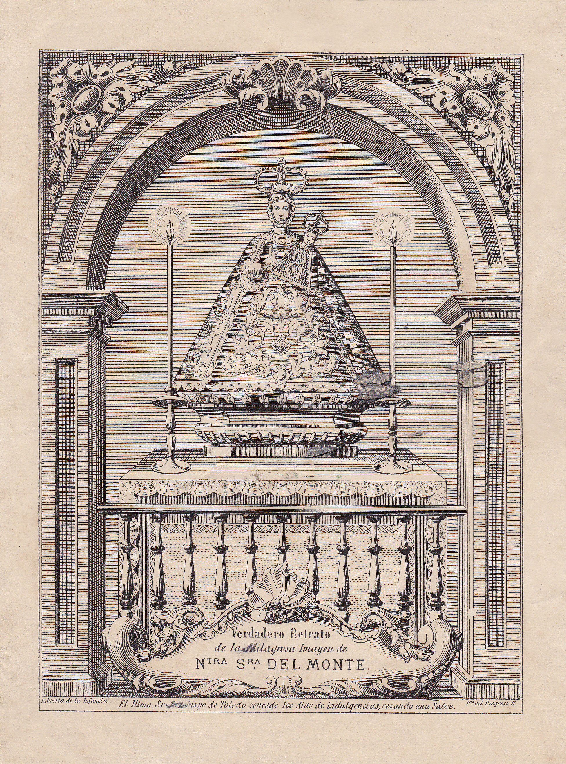 Grabado del siglo XVIII de la imagen de Ntra. Sra. del Monte.